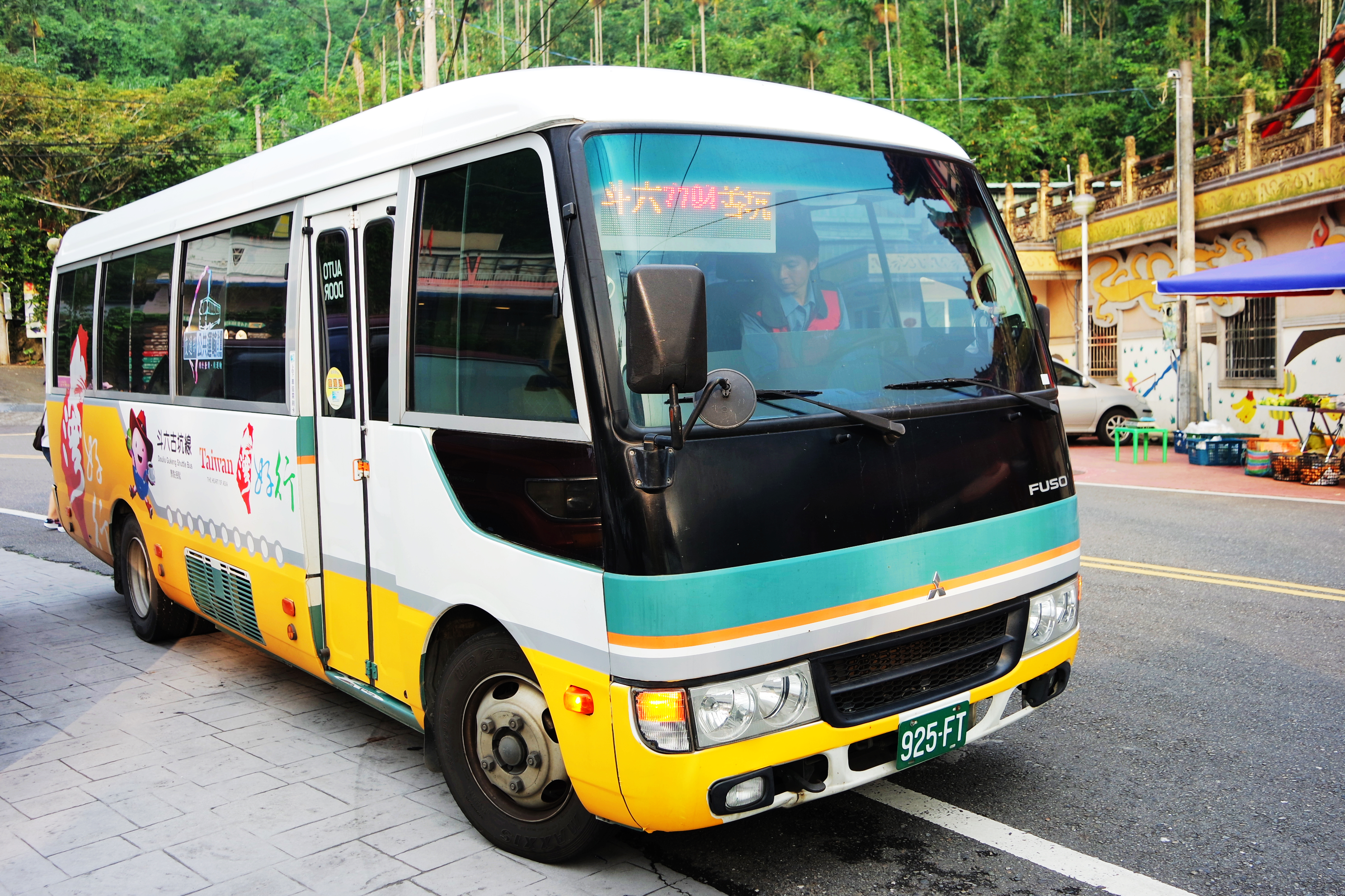 中文（台灣）: 嘉義客運925-FT行駛台灣好行斗六古坑線。